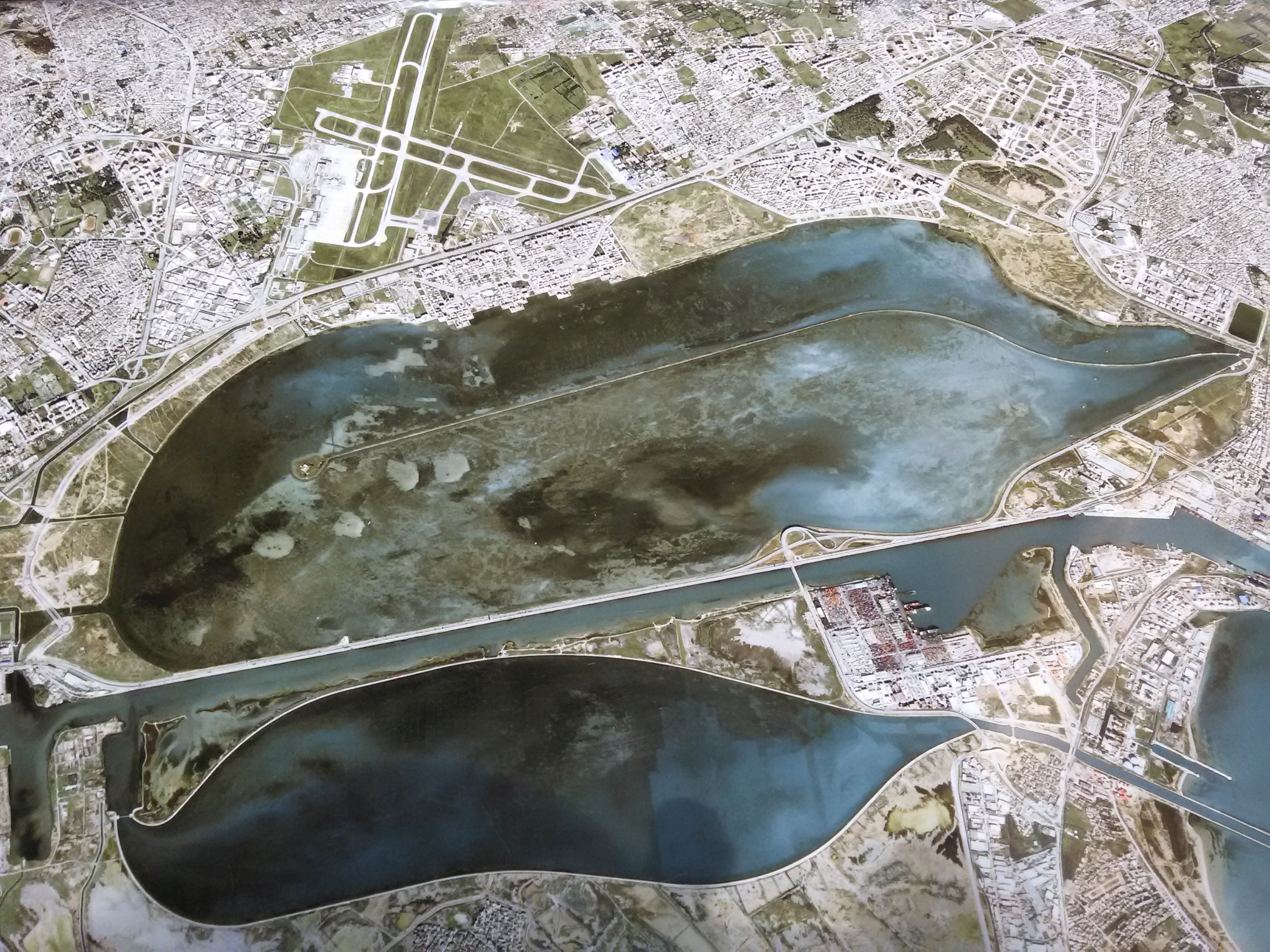 Satellite view